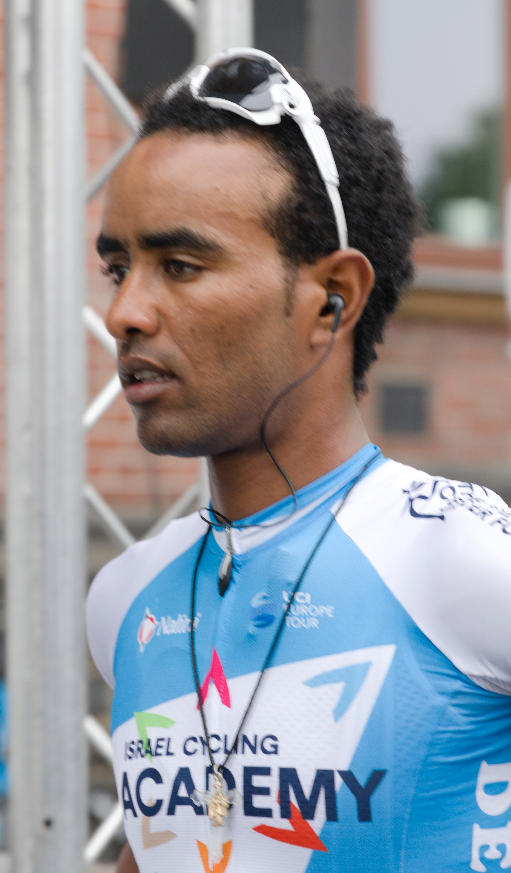 Awet Gebremedhin, schwedischer Radsportler